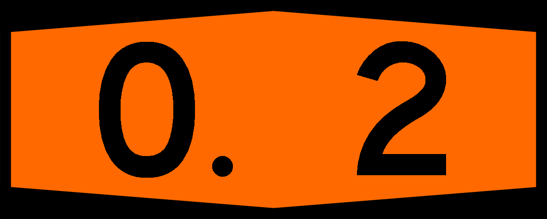 Otoyol 2